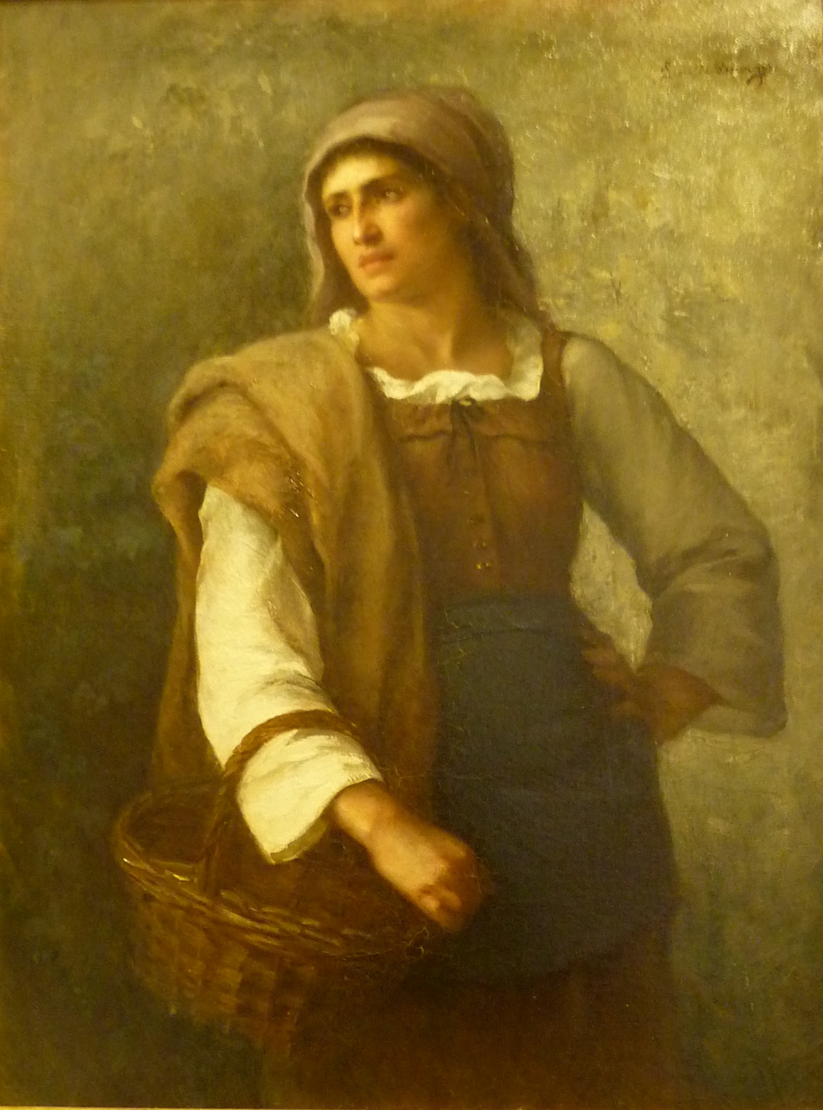 Léonide Bourges : Paysanne (huile sur toile, avant 1886, musée des veaux-arts de Morlaix)